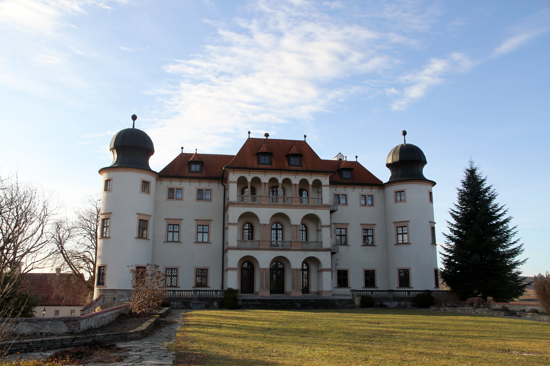 Ostansicht des Schlosses Sitzenberg in der niederösterreichischen Gemeinde Sitzenberg-Reidling.